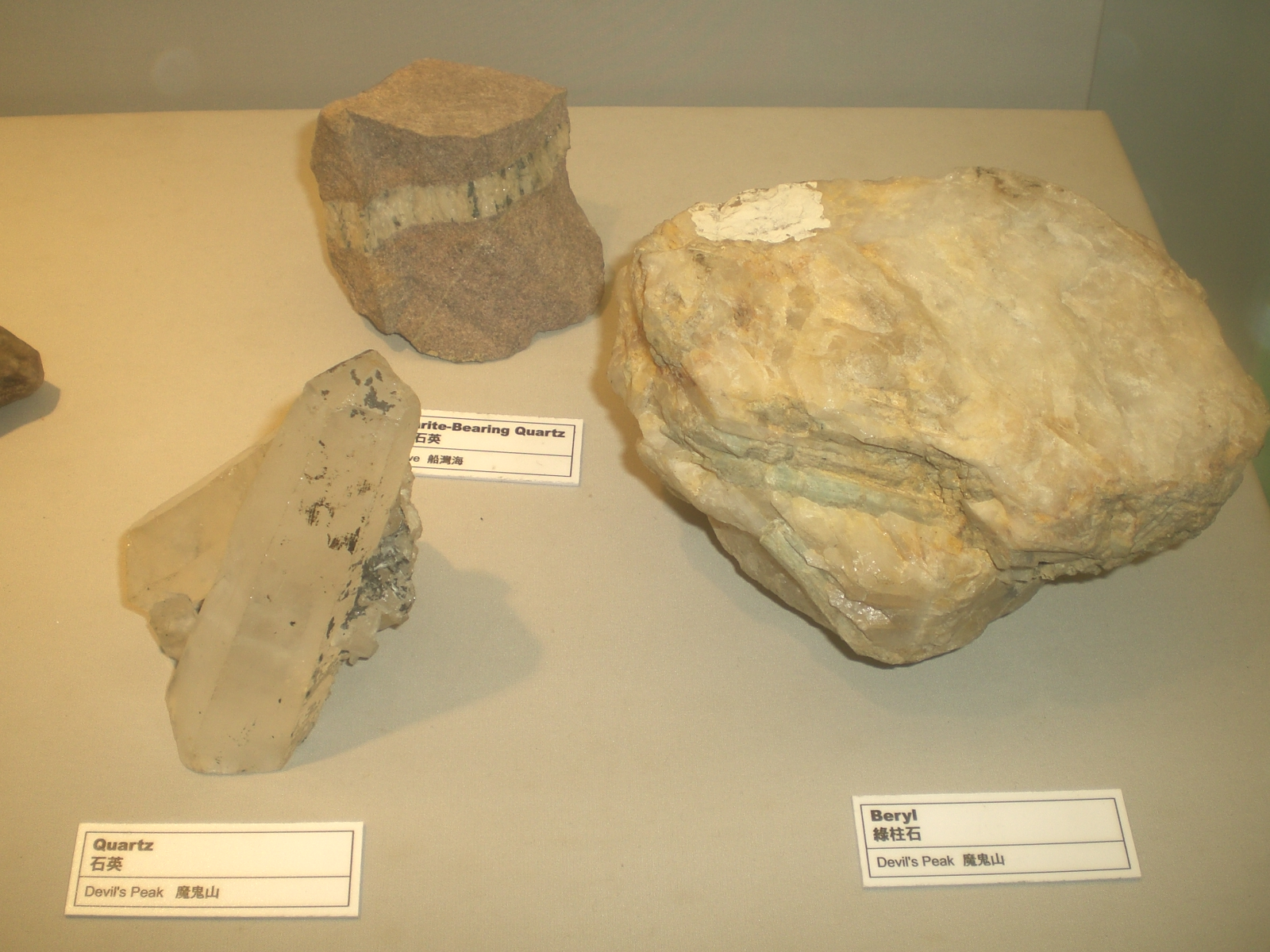 香港大學許士芬地質博物館